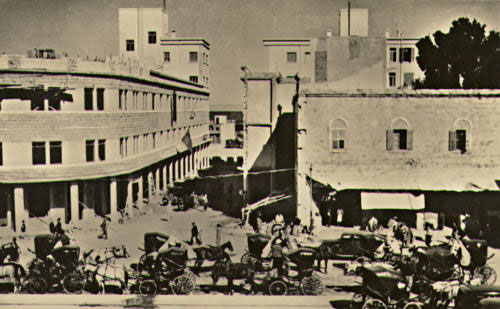 Hamra square - Haifa. it was the transportation hub of Haifa and the gate to Kasbah כיכר חמרה הייתה כיכר בצורת מלבן בעיר התחתית של חיפה תחילתה בבתקופה העות'מאנית. הכיכר התפתחה בצמוד לשער המערבי של "חיפה החדשה" שהייתה בין החומות. הכיכר שימשה כמרכז הפעילות של העיר כיכר חמרה מבט לכוון צפון, פינת רחוב אליהו של היום